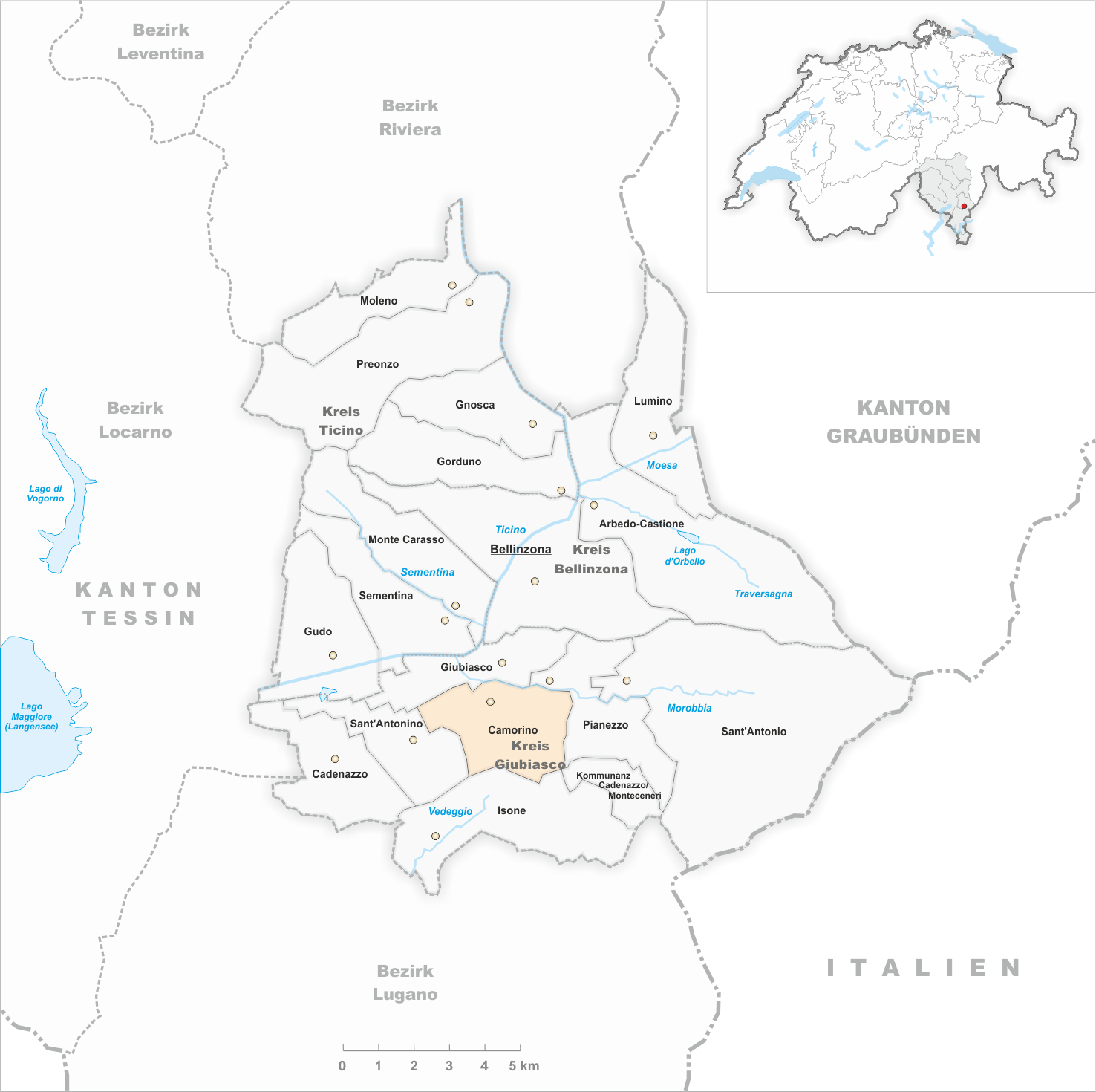 Municipality Camorino